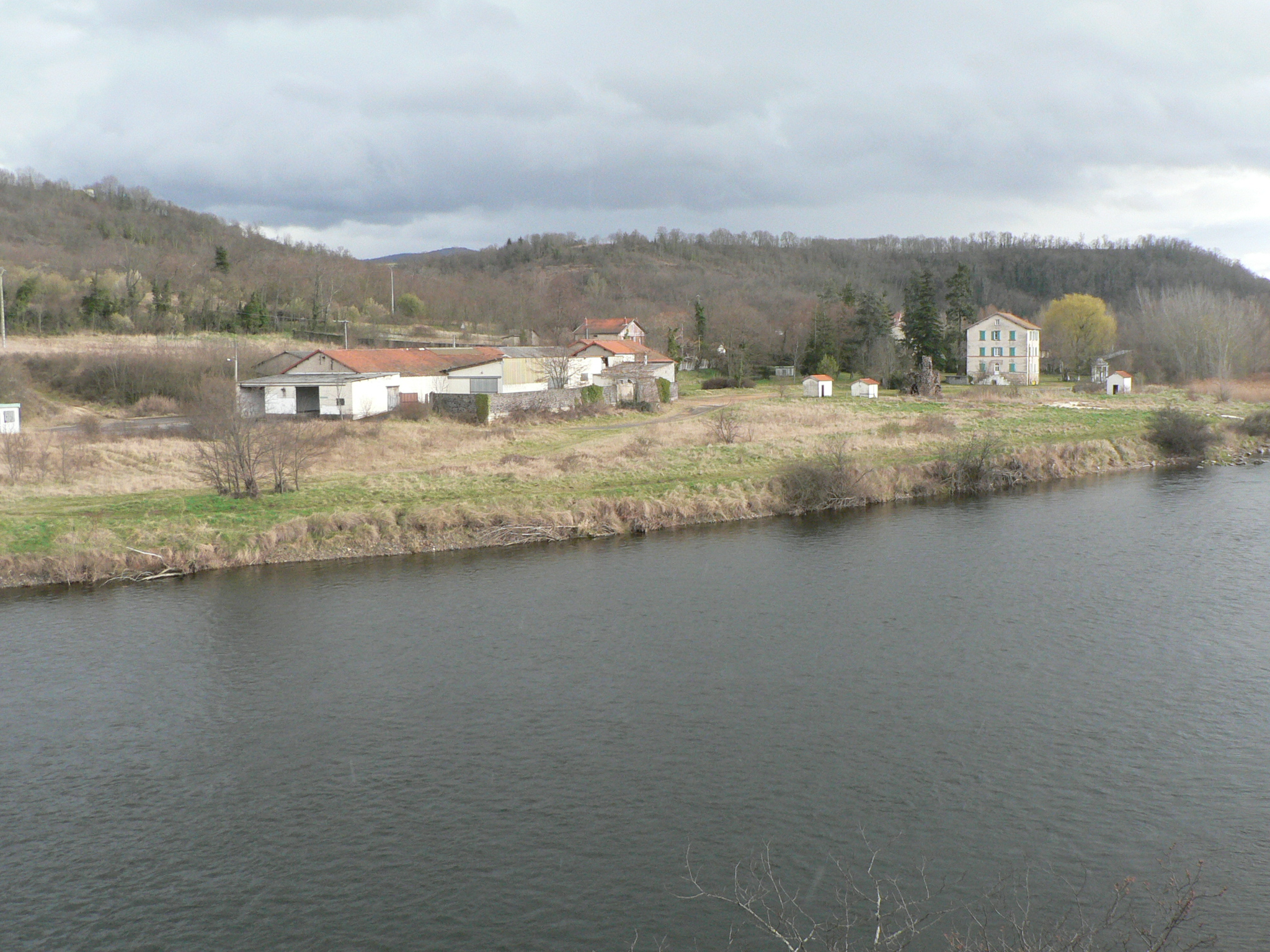 L'ancienne usine de la source Sainte Marguerite, vue depuis les Rocs bleus sur les rives de l'Allier.